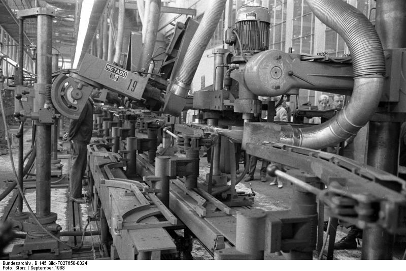 Autowerk BMW-München